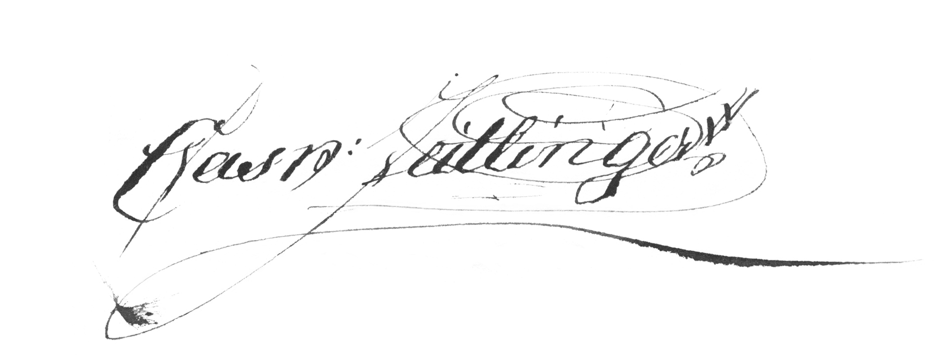 Unterschrift von Caspar Zeitlinger auf einem Pachtvertrag